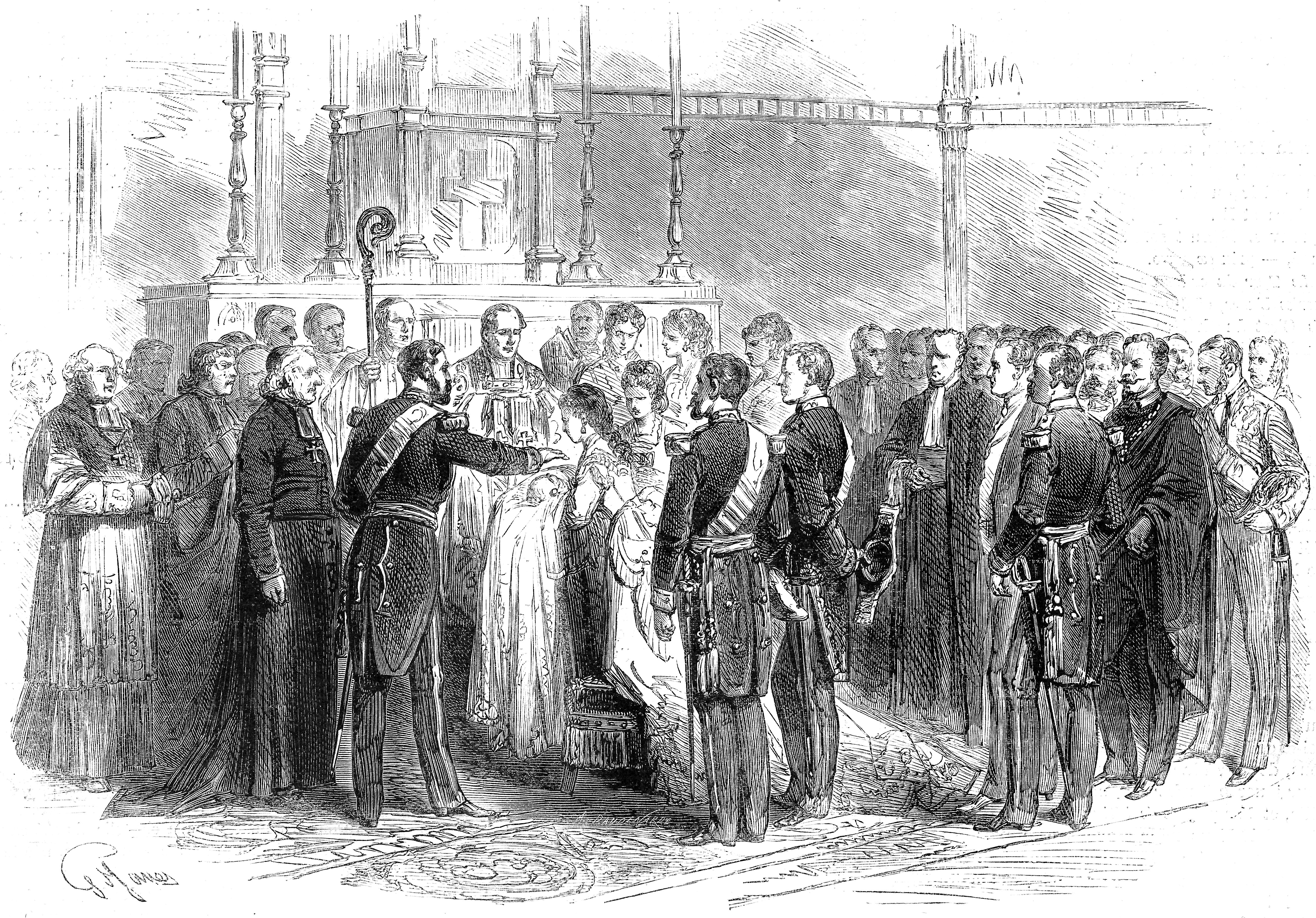 Baptême de la princesse Clémentine de Belgique, château de Laeken, le 3 septembre 1872.